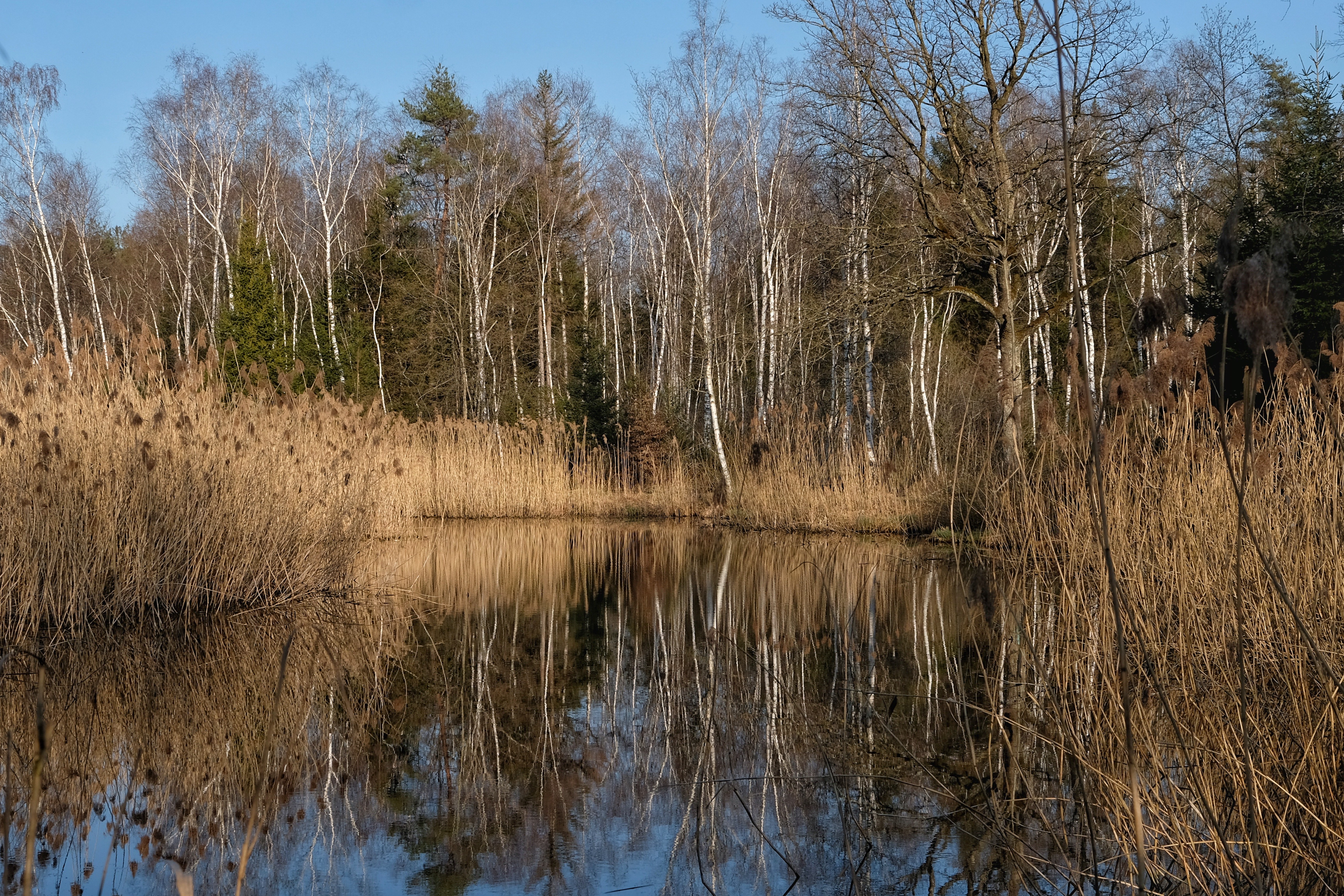 Hudelmoos Naturschutzgebiet Zihlschlacht-Sitterdorf